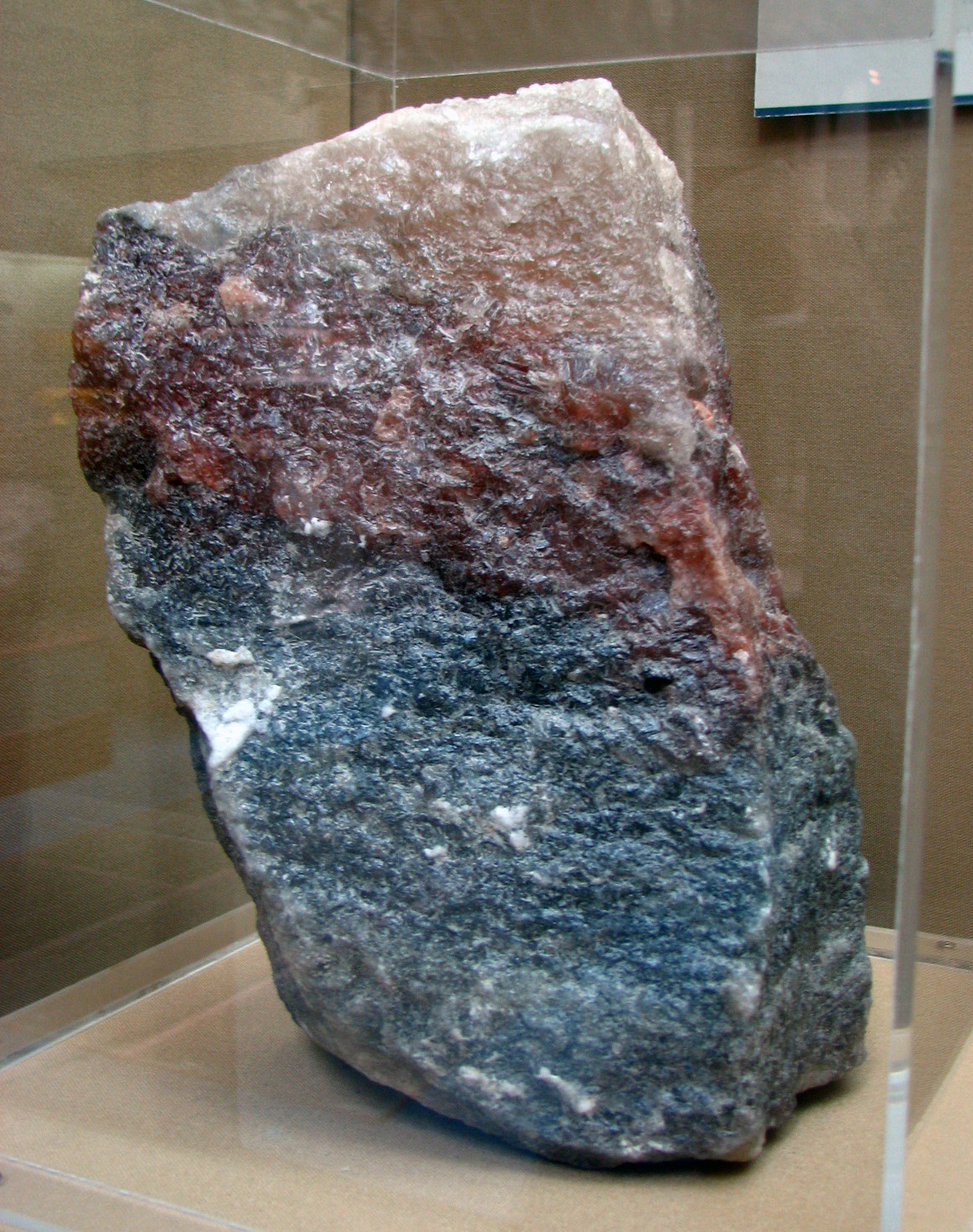 Ejemplar de silvita, del Museo de la Plata